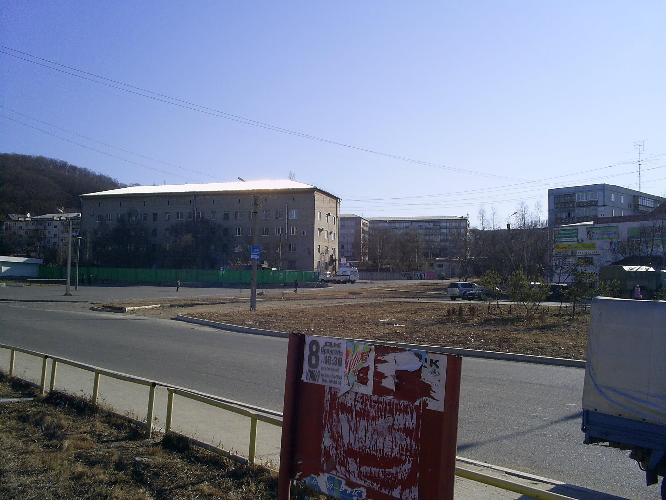 Vrangel, Peimorsky Kray